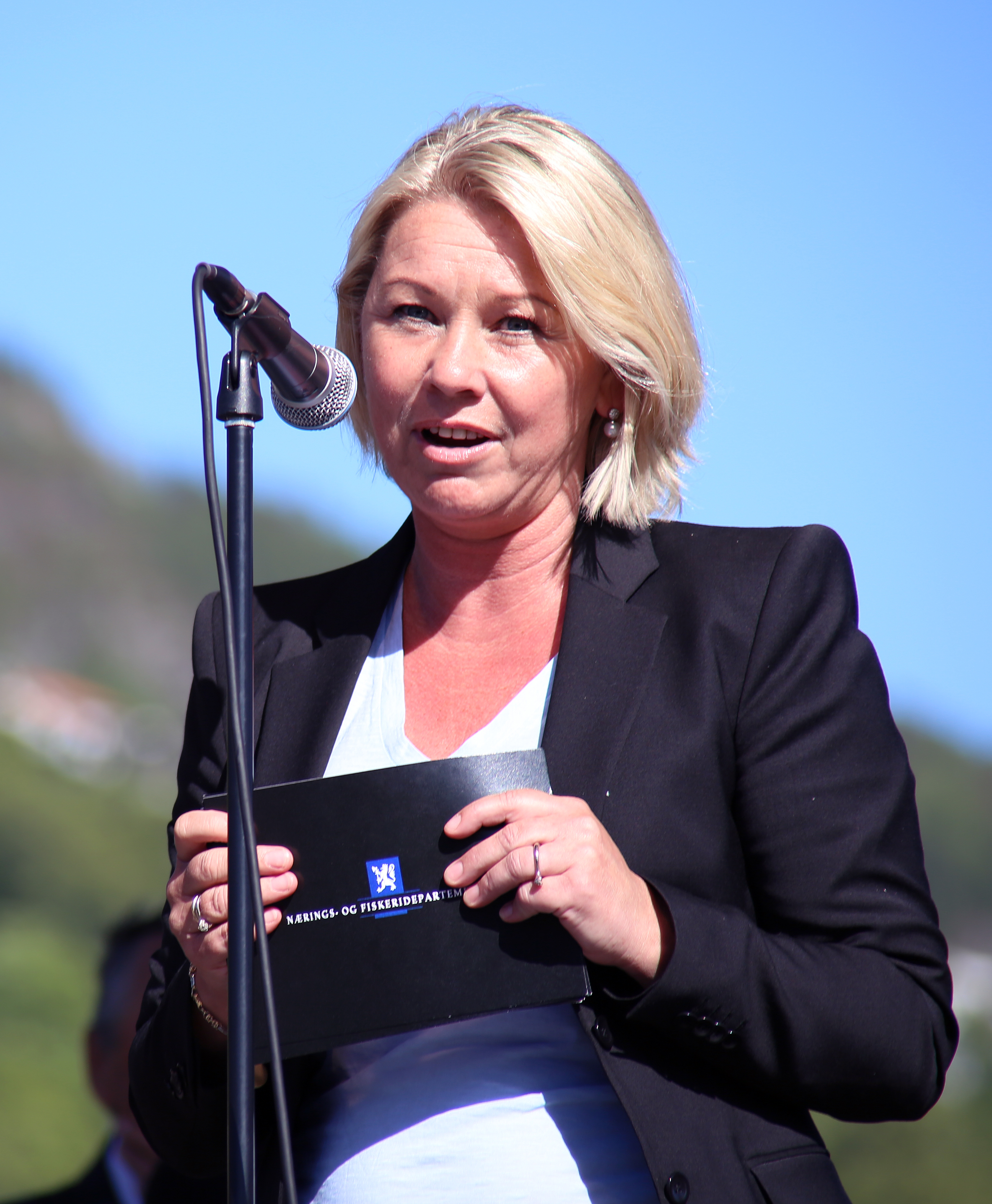 Monica Mæland